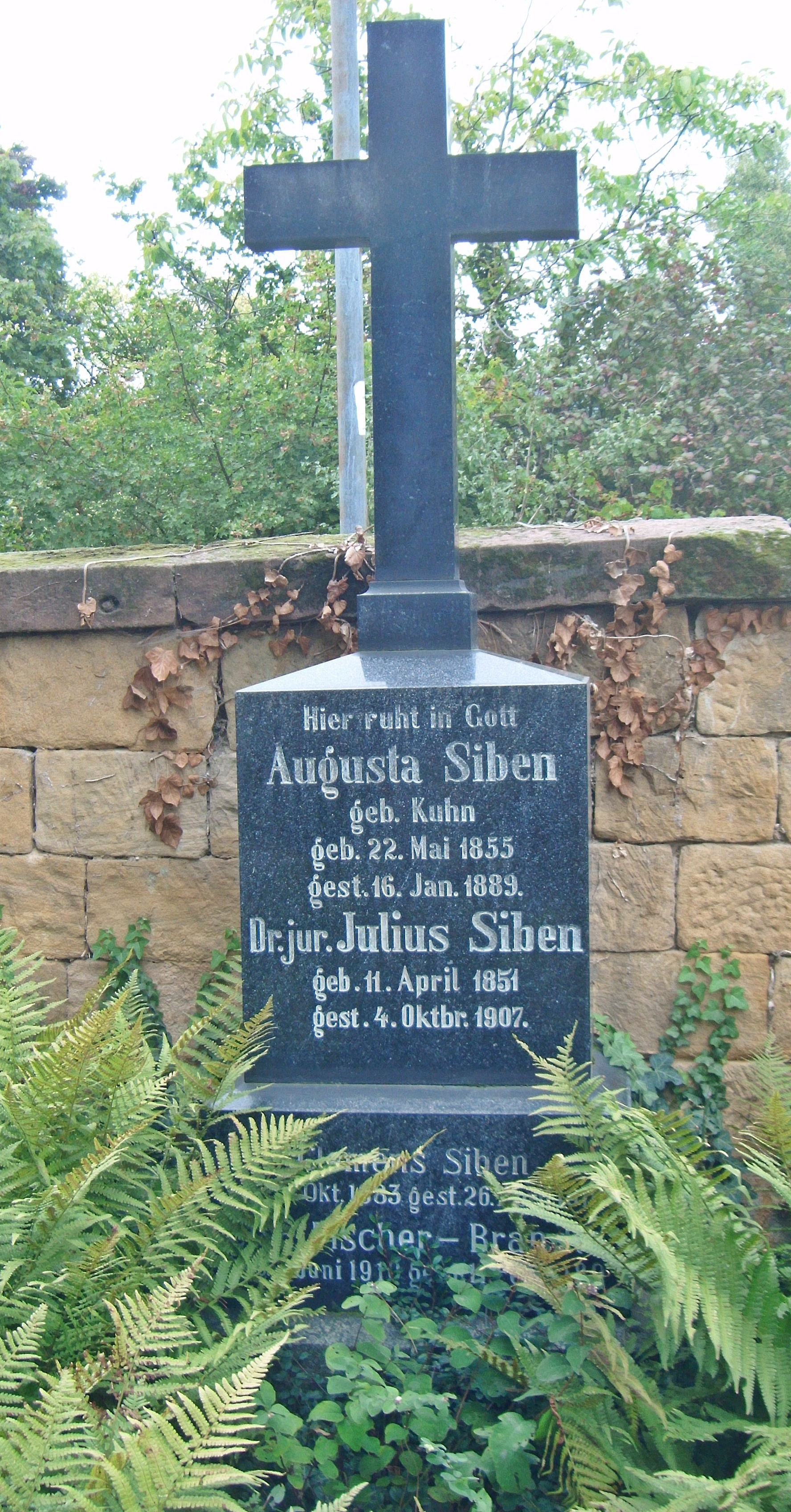 Grab von Julius Siben (1851-1907), bayerischer Landtagsabgeordneter, Friedhof Deidesheim, Rheinland-Pfalz